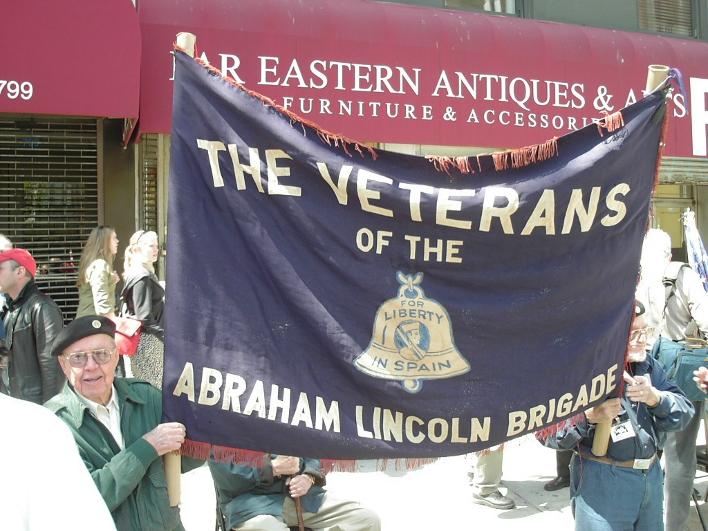 Veteranos del Batallón Lincoln